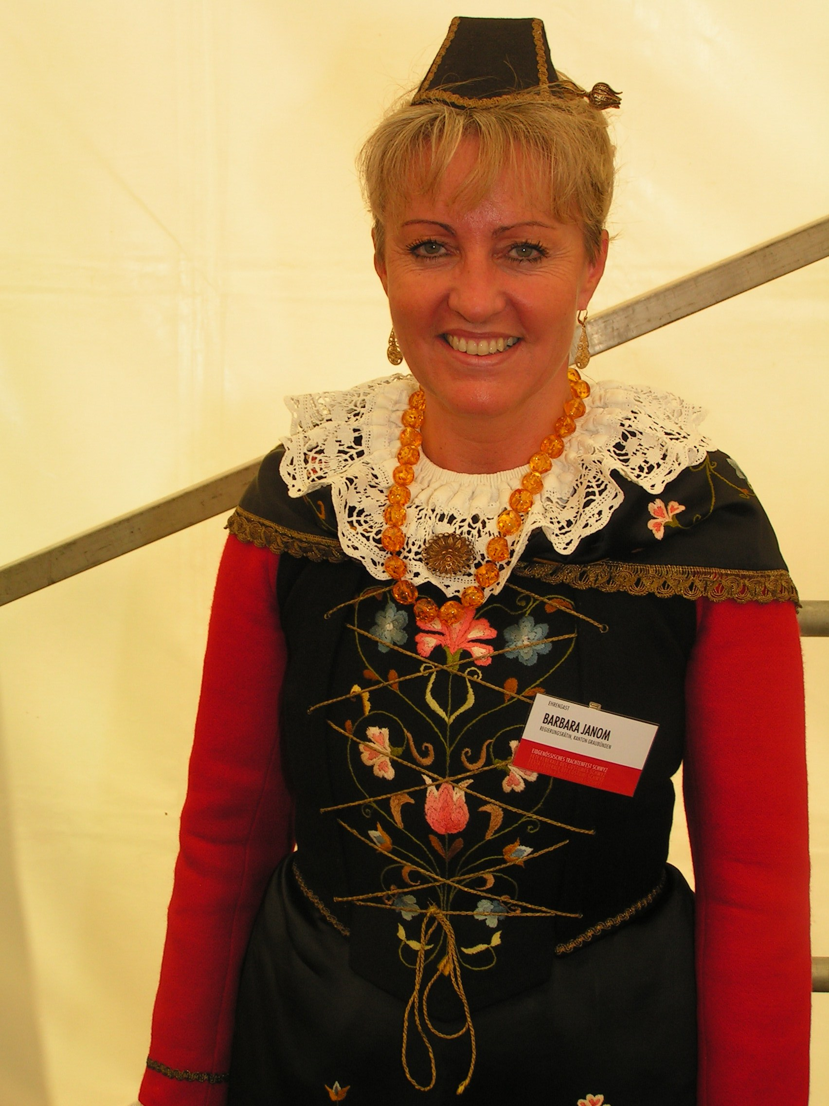 Bündner Regierungsrätin Barbara Janom Steiner im Trachtenkleid